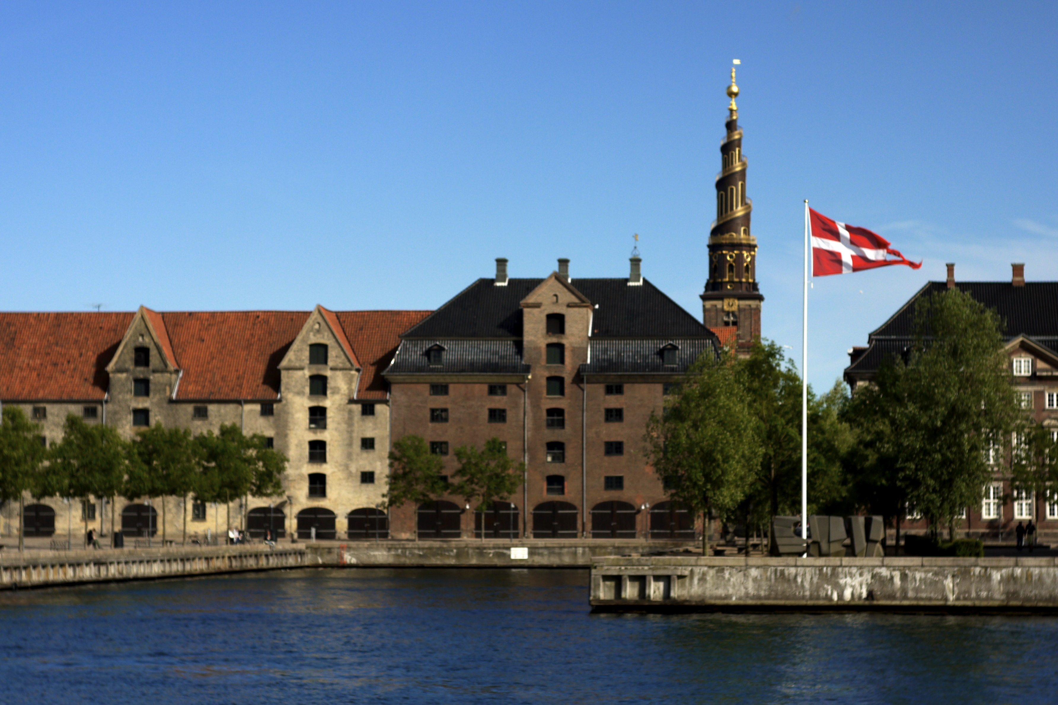 Asiatisk Plads, in Copenhagen, Denmark